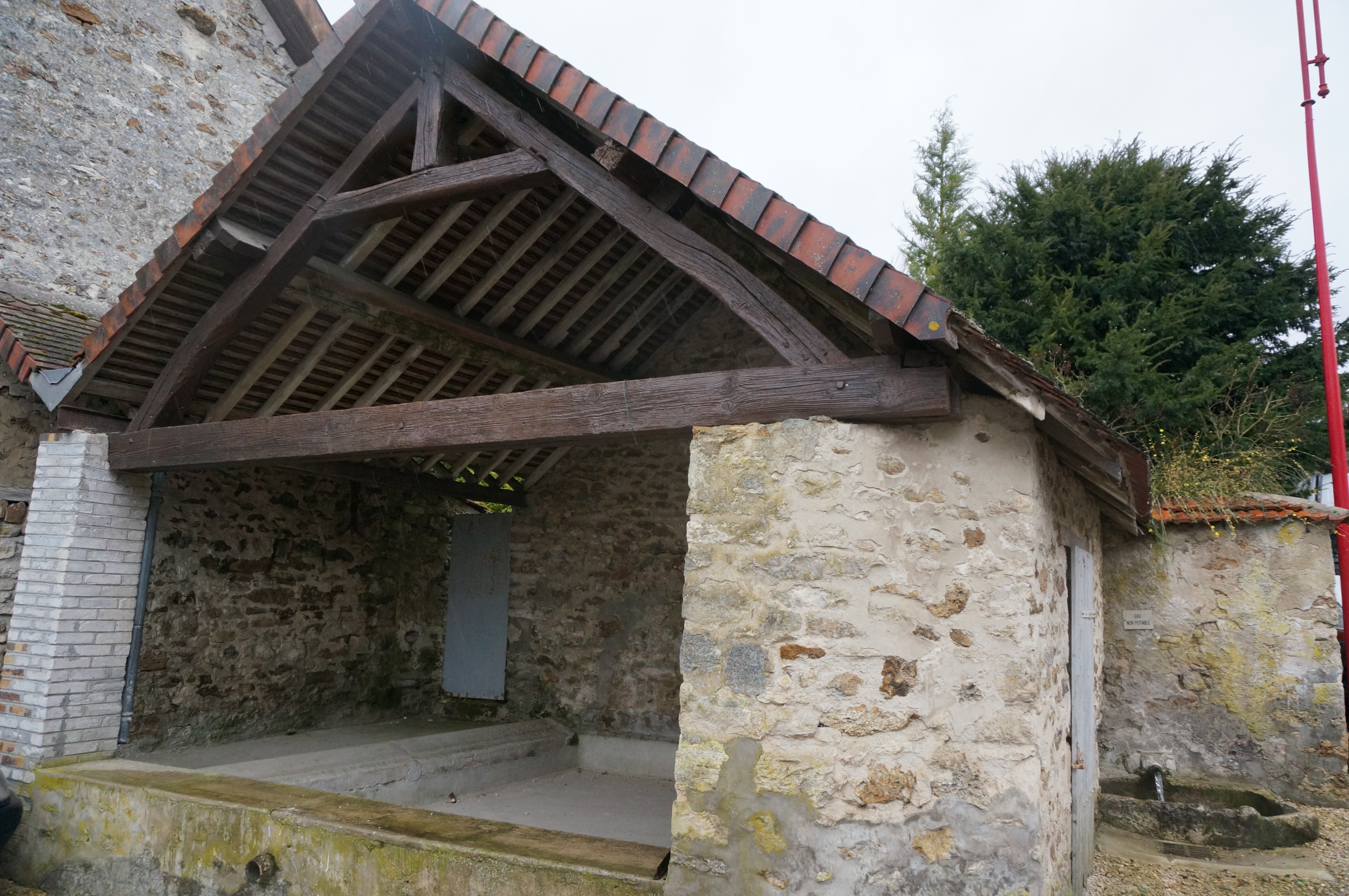 Photos prise à Aougny.